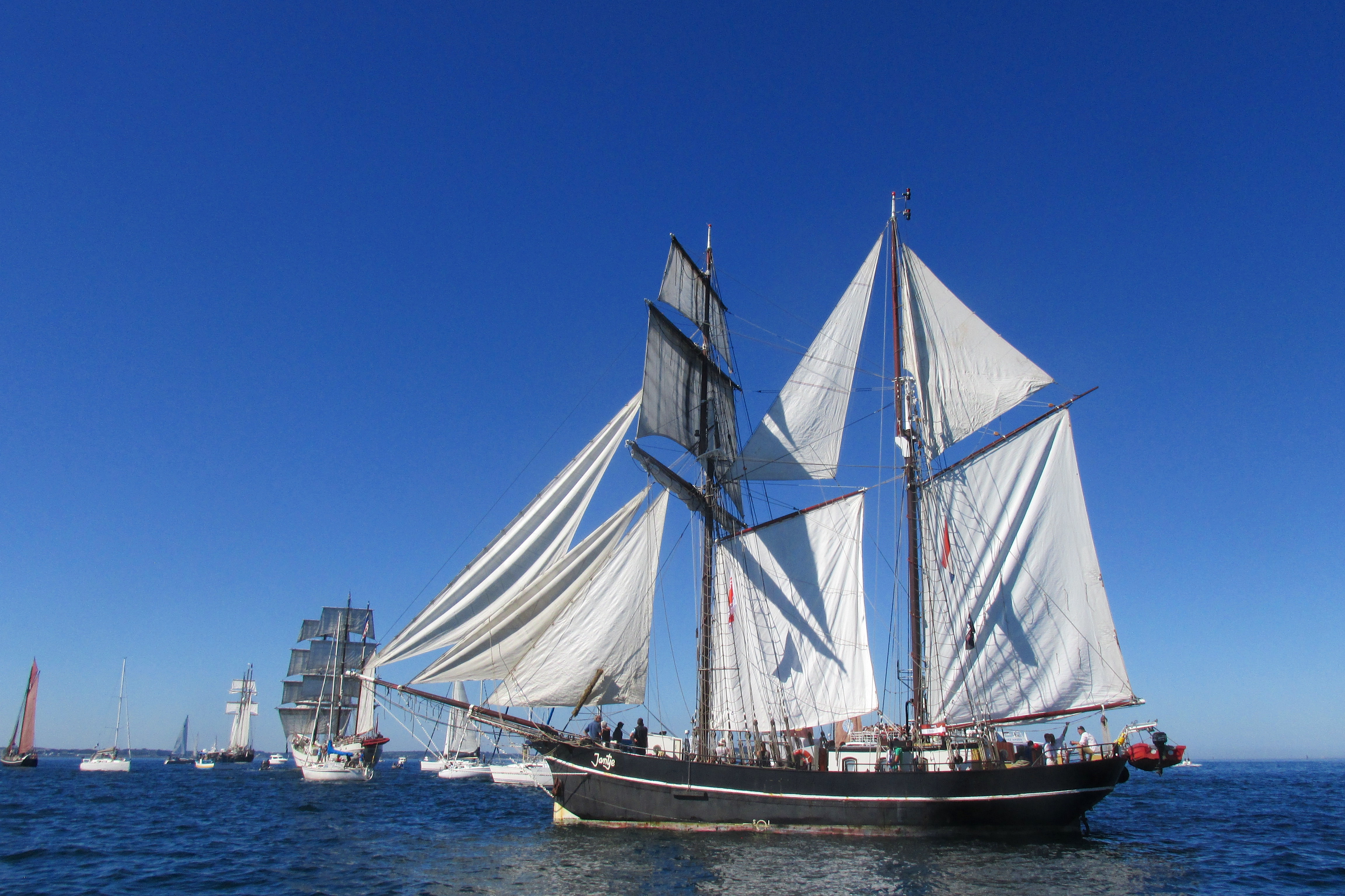 Brick-goélette néerlandais Jantje